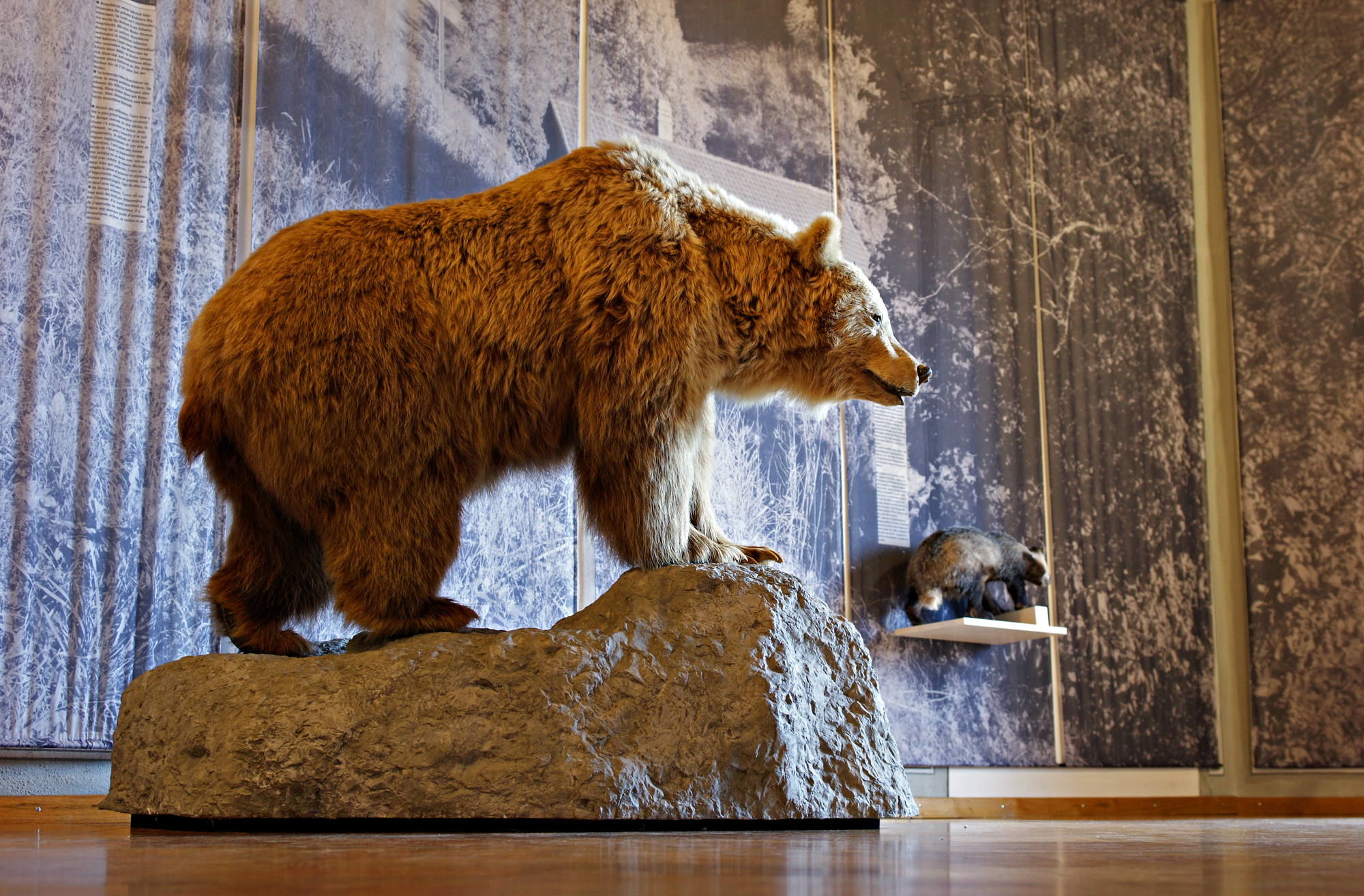 Jagdmuseum Schloss Landshut, Utzenstorf